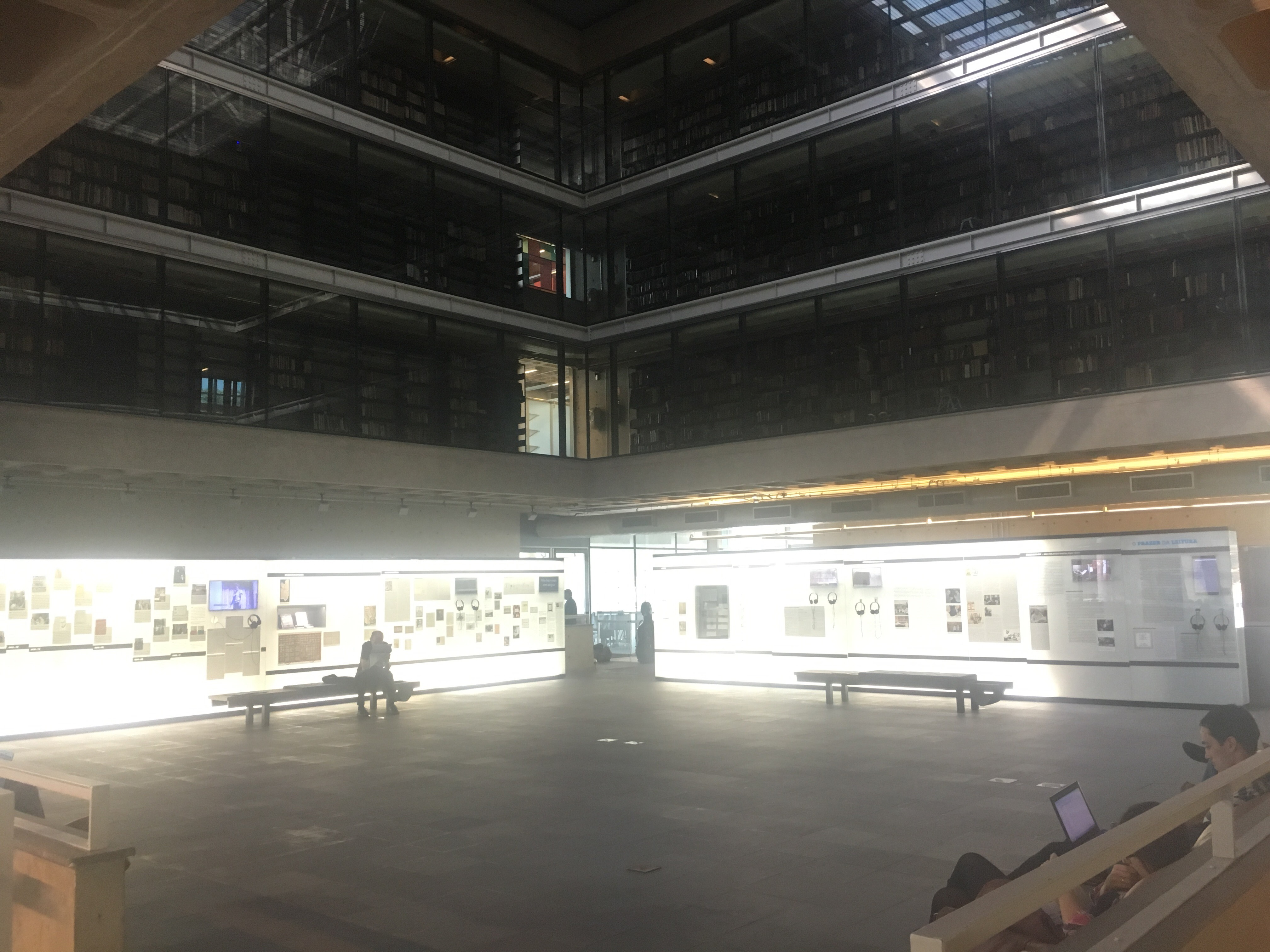 Área térrea da biblioteca.